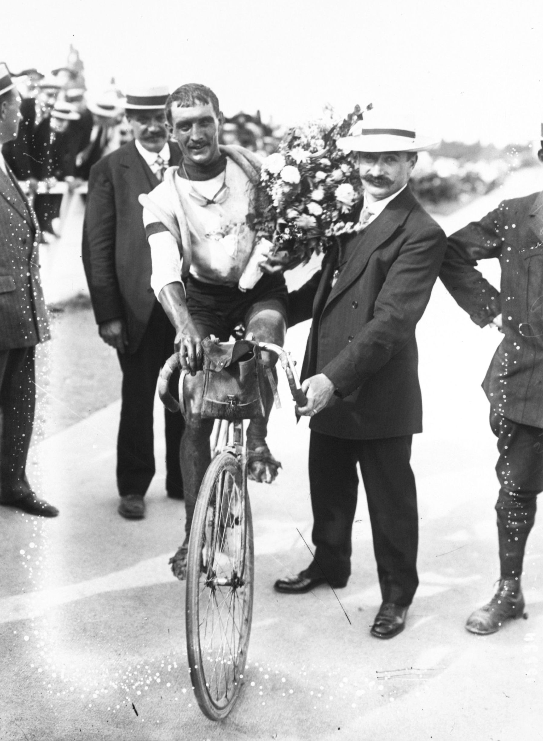 Tour de France (course cycliste) Légendes:Tour de France, 30 juillet 1911, Godivier 1er de la dernière étape